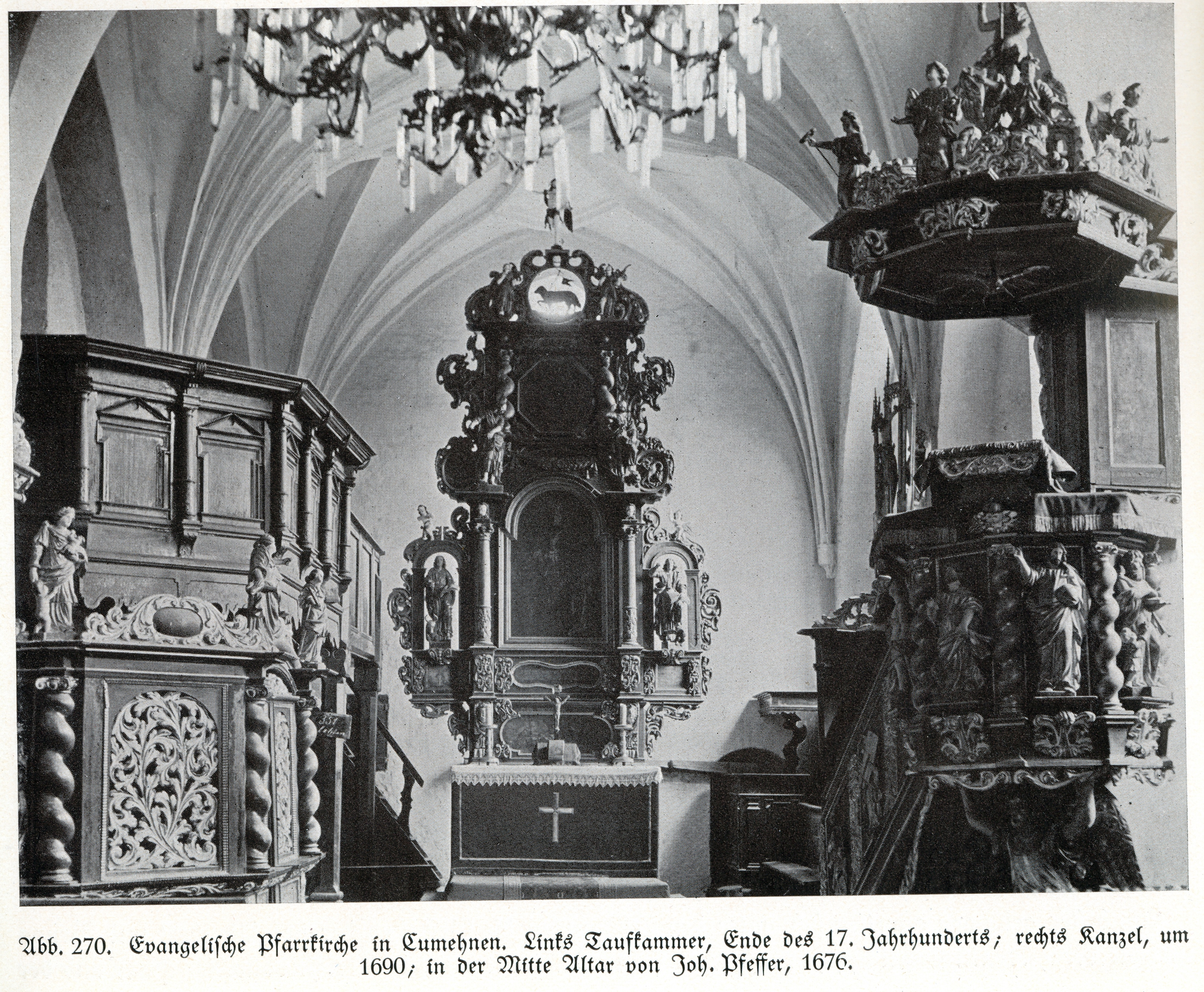 Cumehnen, evangelische Pfarrkirche, Taufkammer, Kanzel und Altar von Joh. Pfeffer, 1676